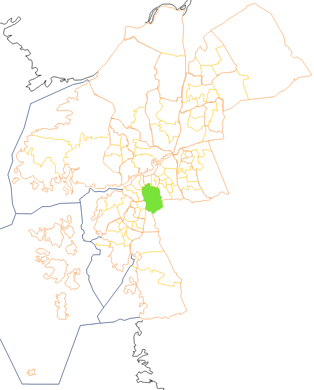 Karta som visar primärområdes belägenhet i Göteborg